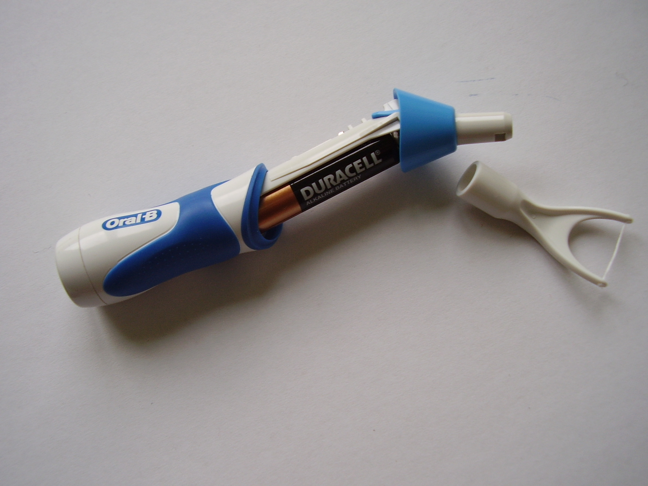 Batteriebetriebener Zahnseidehalter, Floss, vibrating floss